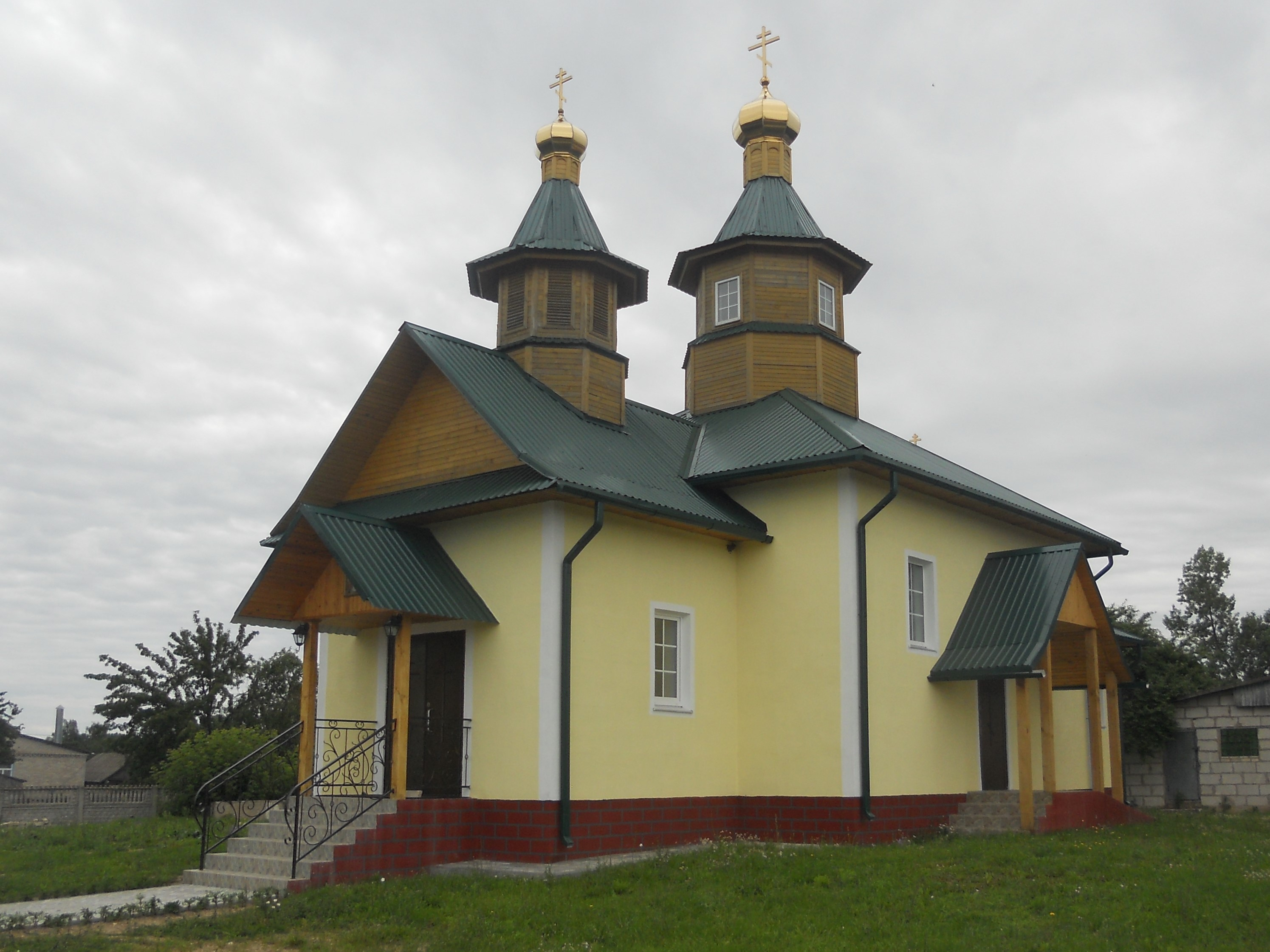 Царква свяціцеля Мікалая Цудатворцы ў Цімкавічах (Беларусь)